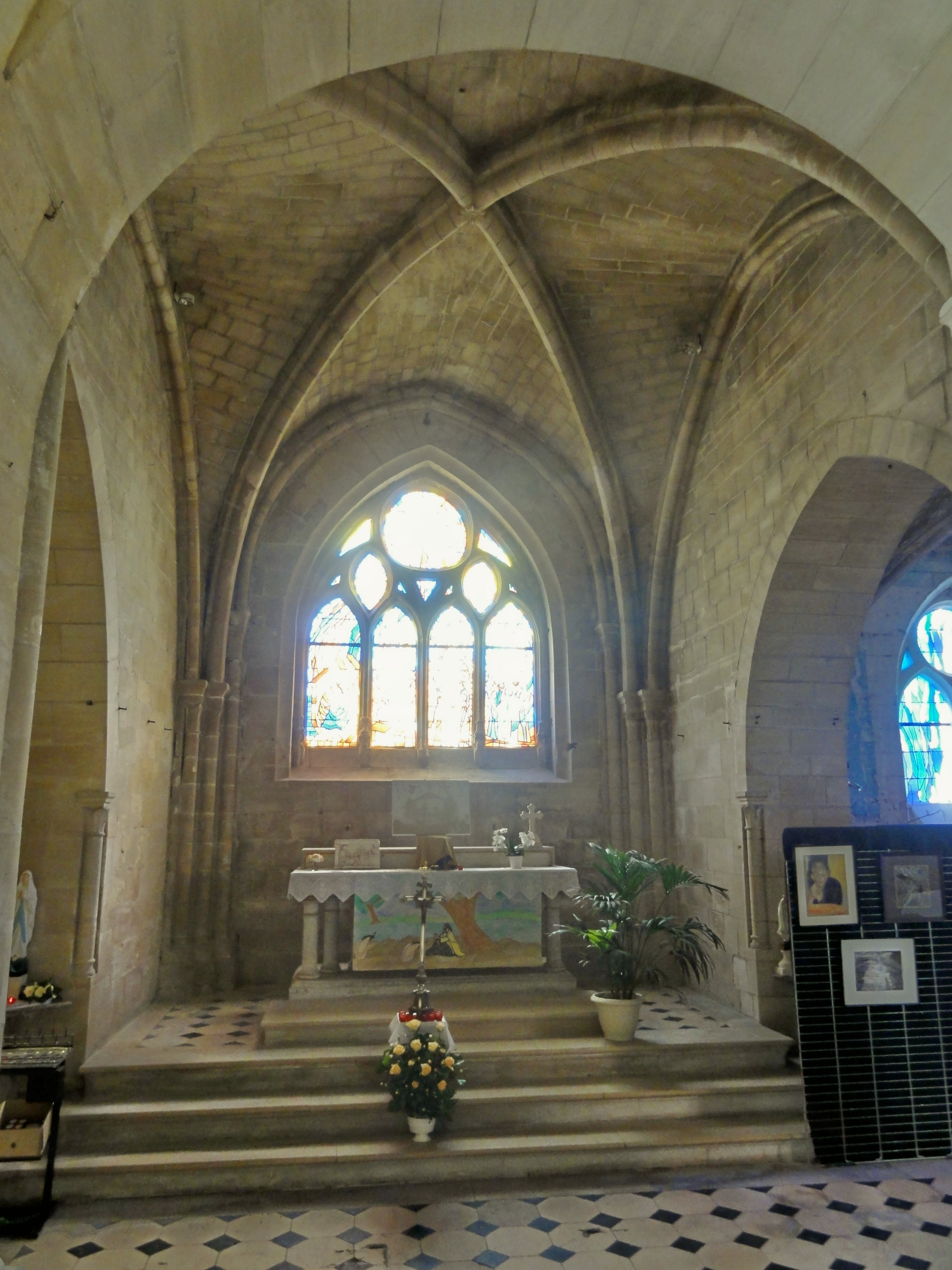 Le chœur.